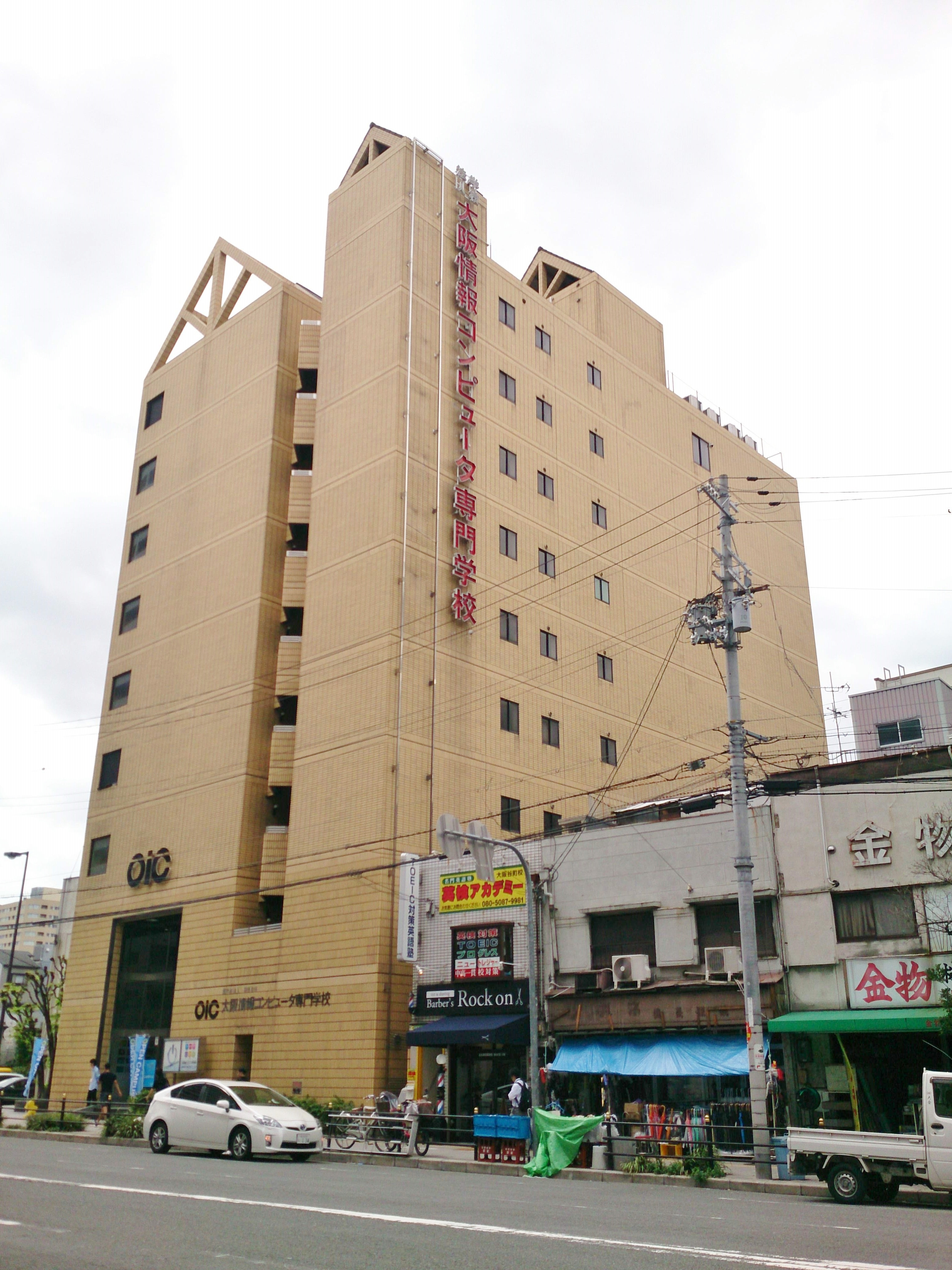 大阪情報コンピュータ専門学校の校舎